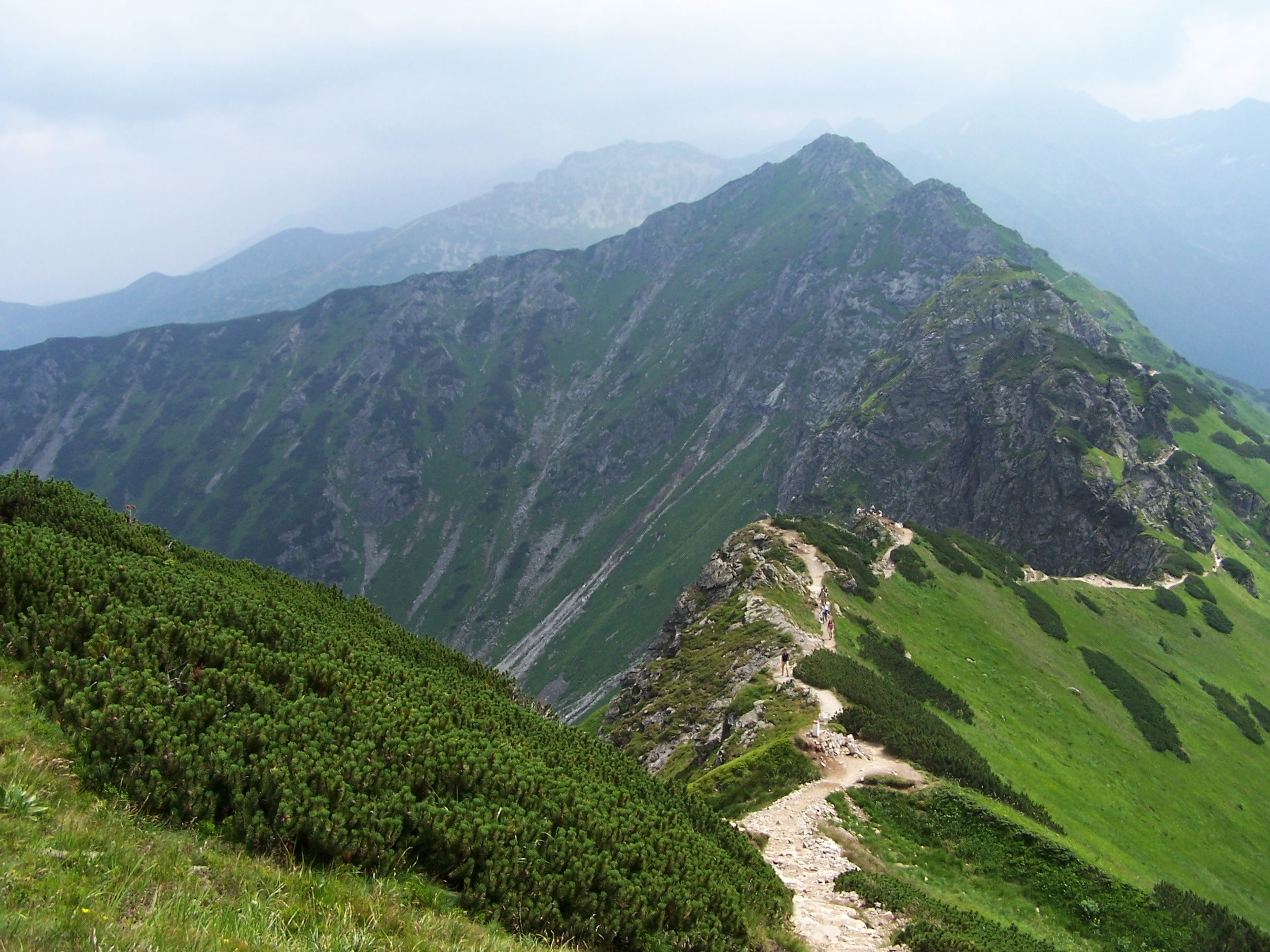 Goryczkowa Czuba